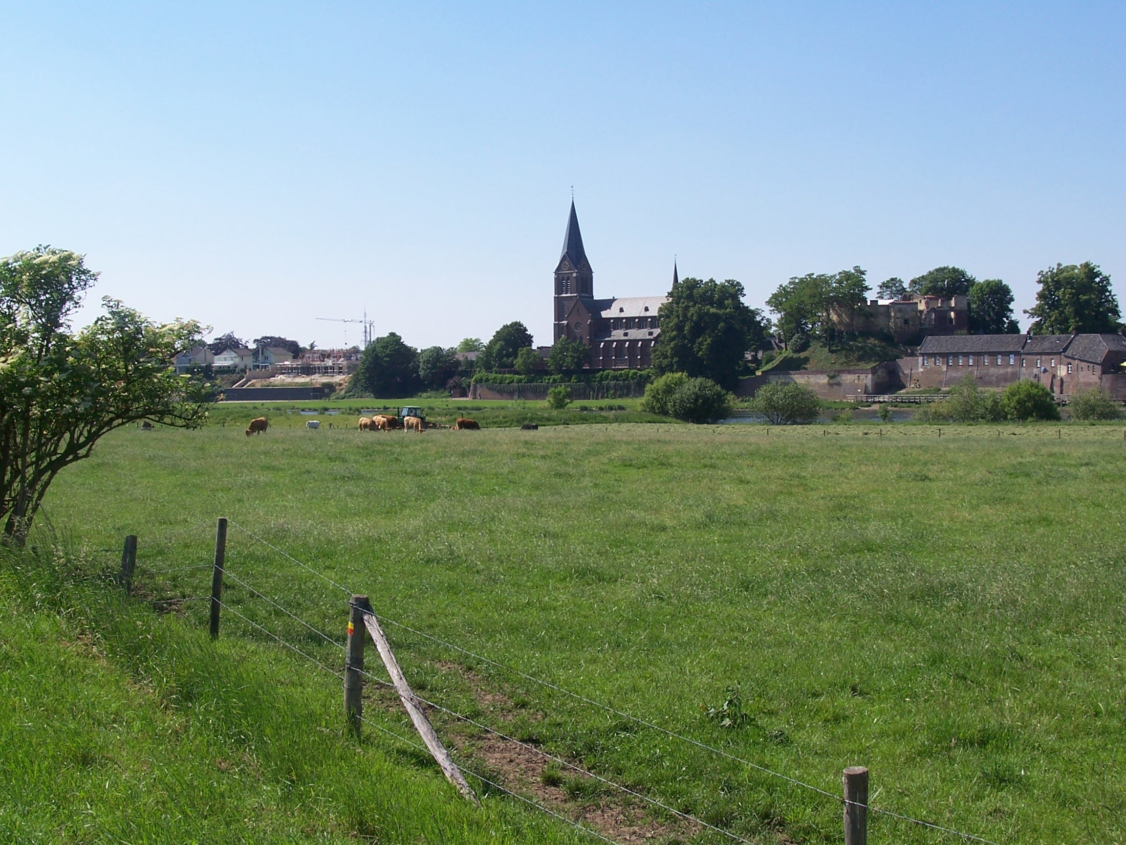 Wandelroute naast de Maas met zicht op Kessel (Limburg)